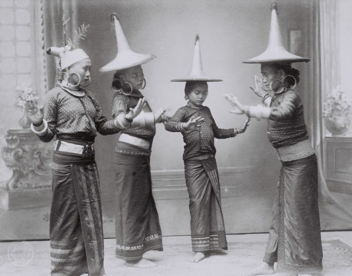 foto. Studioportret van een groep dansende vrouwen uit Zuid-Nias